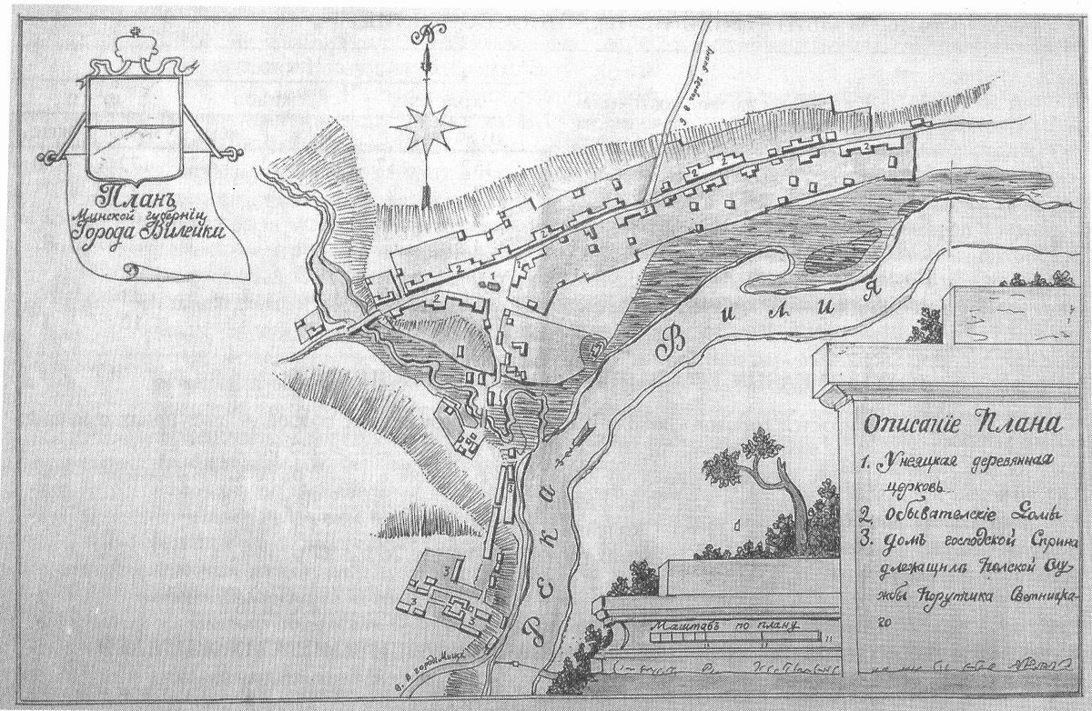 Беларуская (тарашкевіца): Вялейка (Vialejka). Плян места